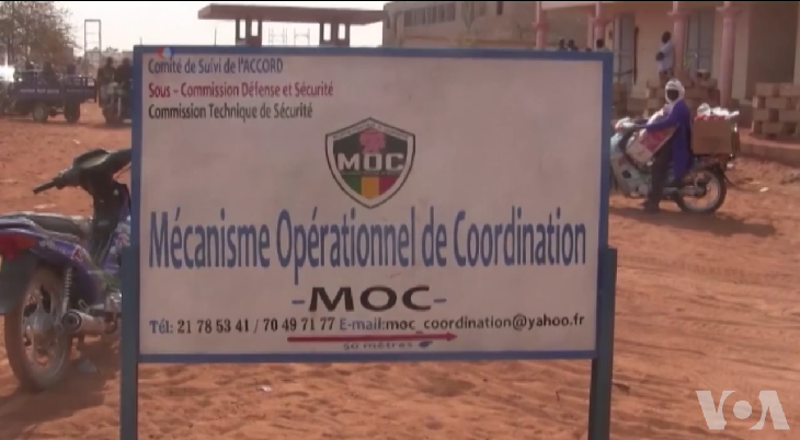 Un panneau du Mécanisme Opérationnel de Coordination à Gao, après une attaque visant les miliciens regroupés dans le cadre de ce mécanisme.